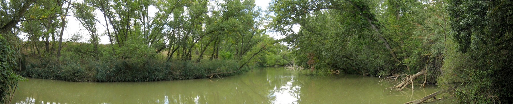 Bocos de Duero, Valle del Cuco, Valladolid, Desembocadura del Arroyo del Cuco en el Río Duero